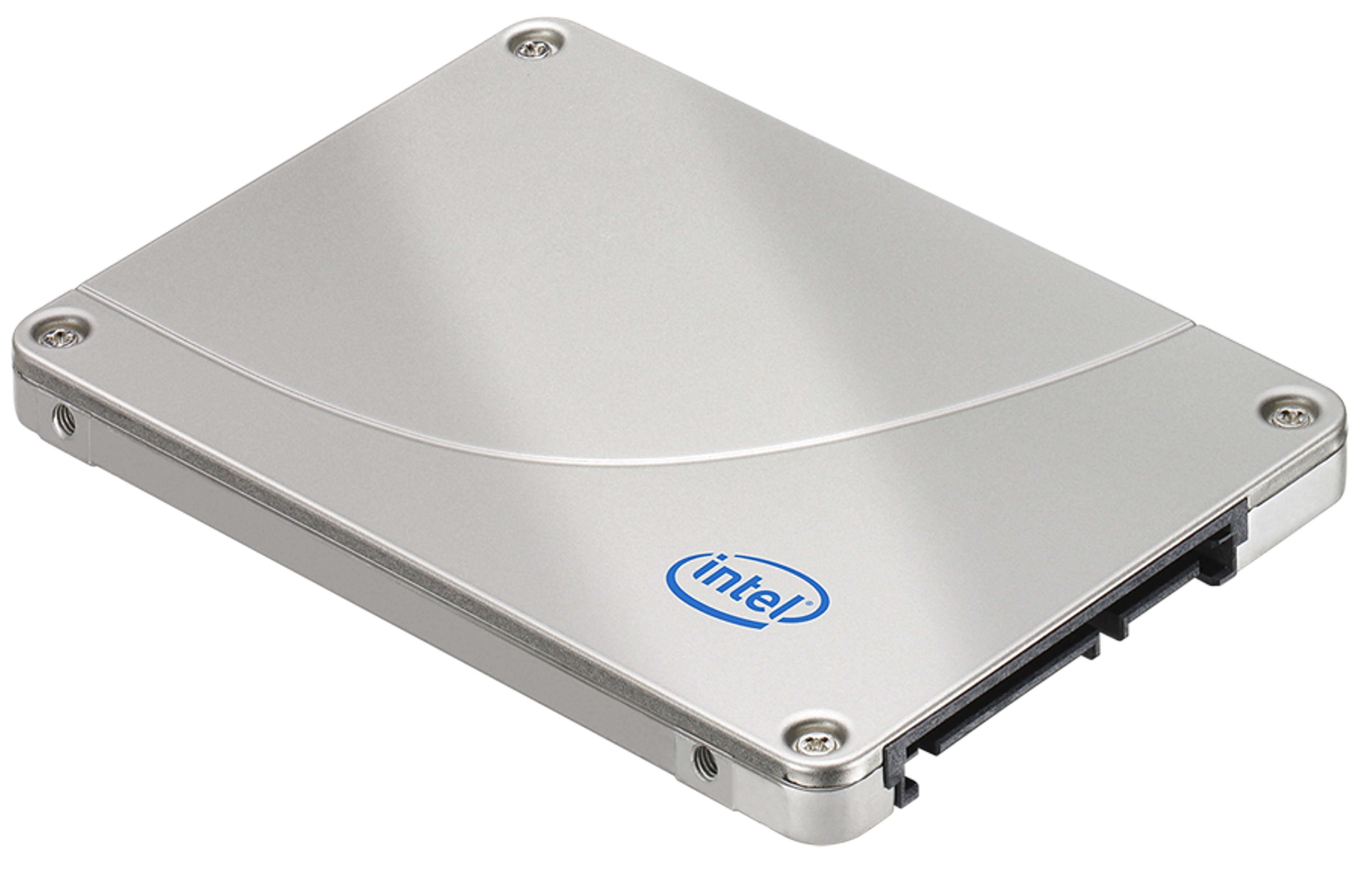 An Intel X25-M Solid state drive.